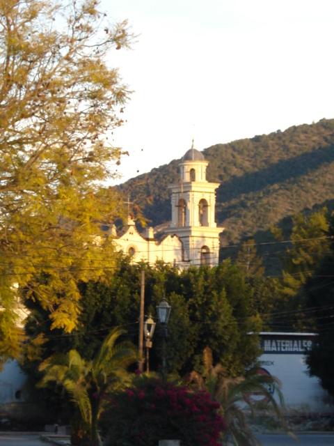 Cardenas San Luis Potosi Mexico.